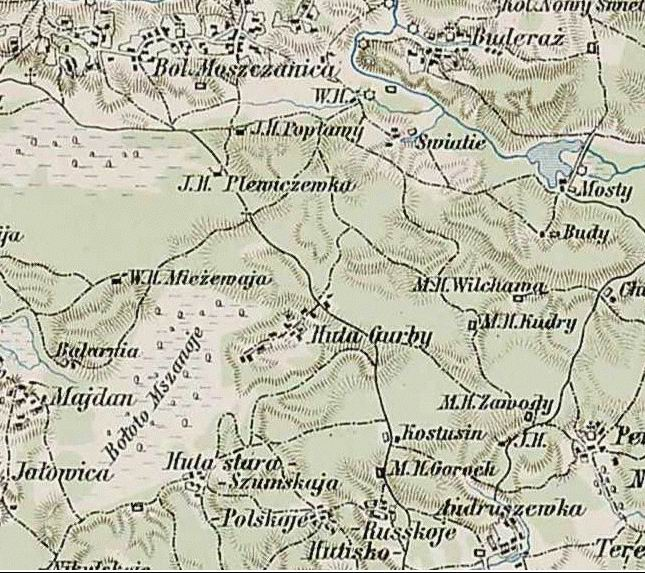 Історичне село Гурби Здолбунівського району та його околиці. Топографічні карти Західної України. Австро-Угорщина.